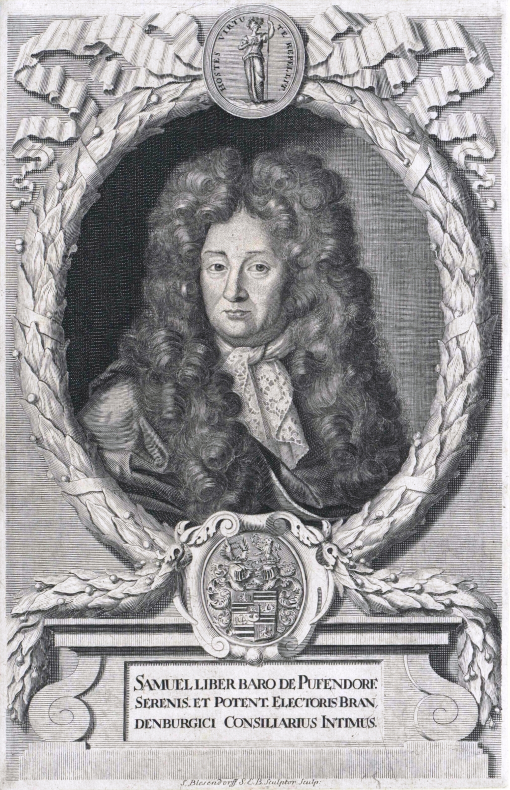 Samuel von Pufendorf; Samuel liber baro Pufendorf. Serenis. et Potent. Electoris Brandenburgici Consiliarius Intimus. ca 20,6 × 32,1 cm